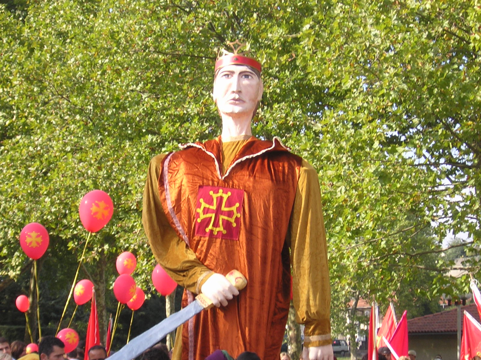 Manifestació occitanista a Carcassona